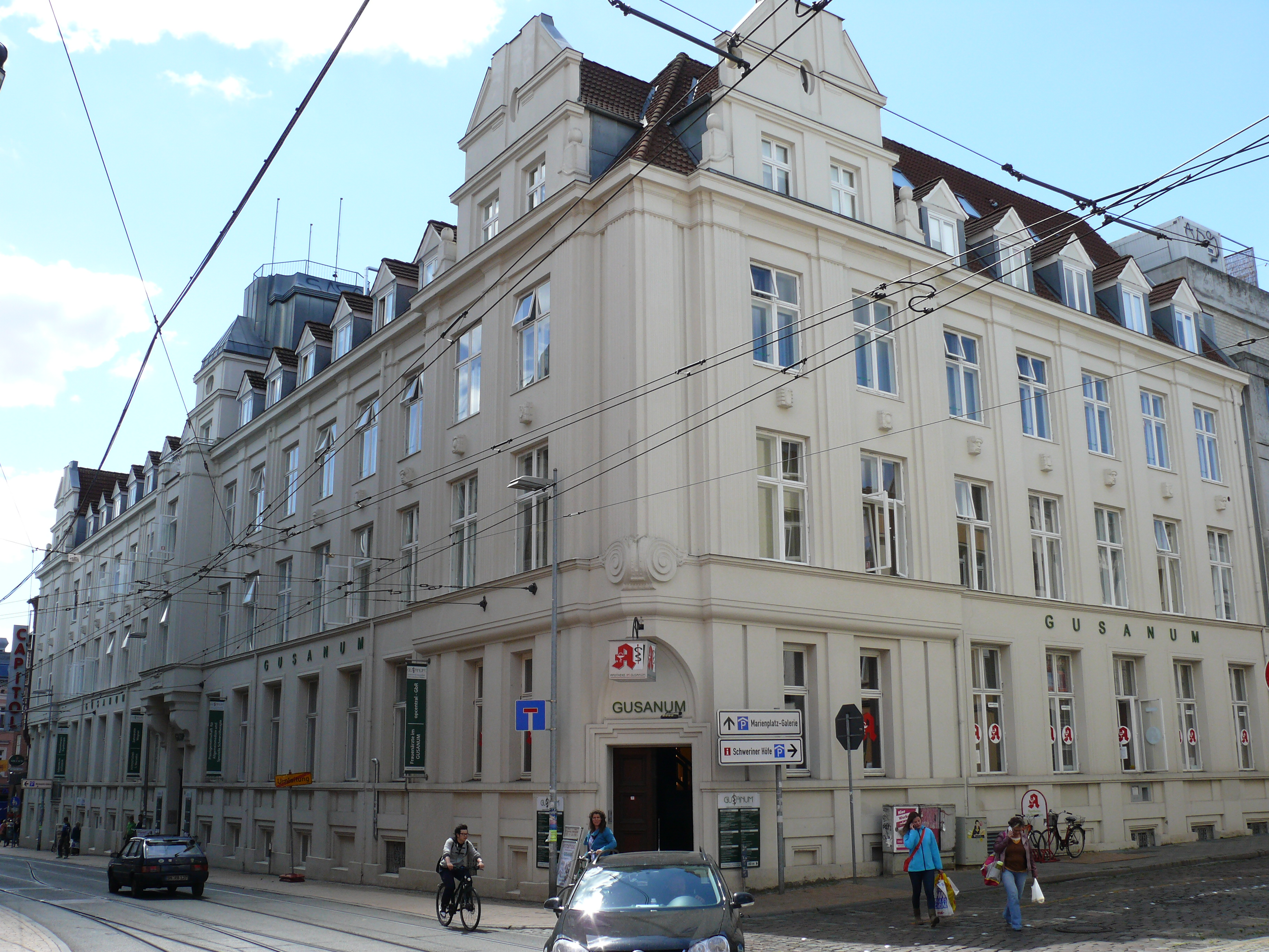 Das Gebäude "Wismarsche Straße 132" in Schwerin.